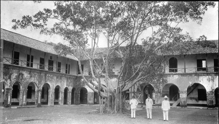 Foto. De binnenplaats van de oude kazerne op het eiland Onrust in de Baai van Batavia